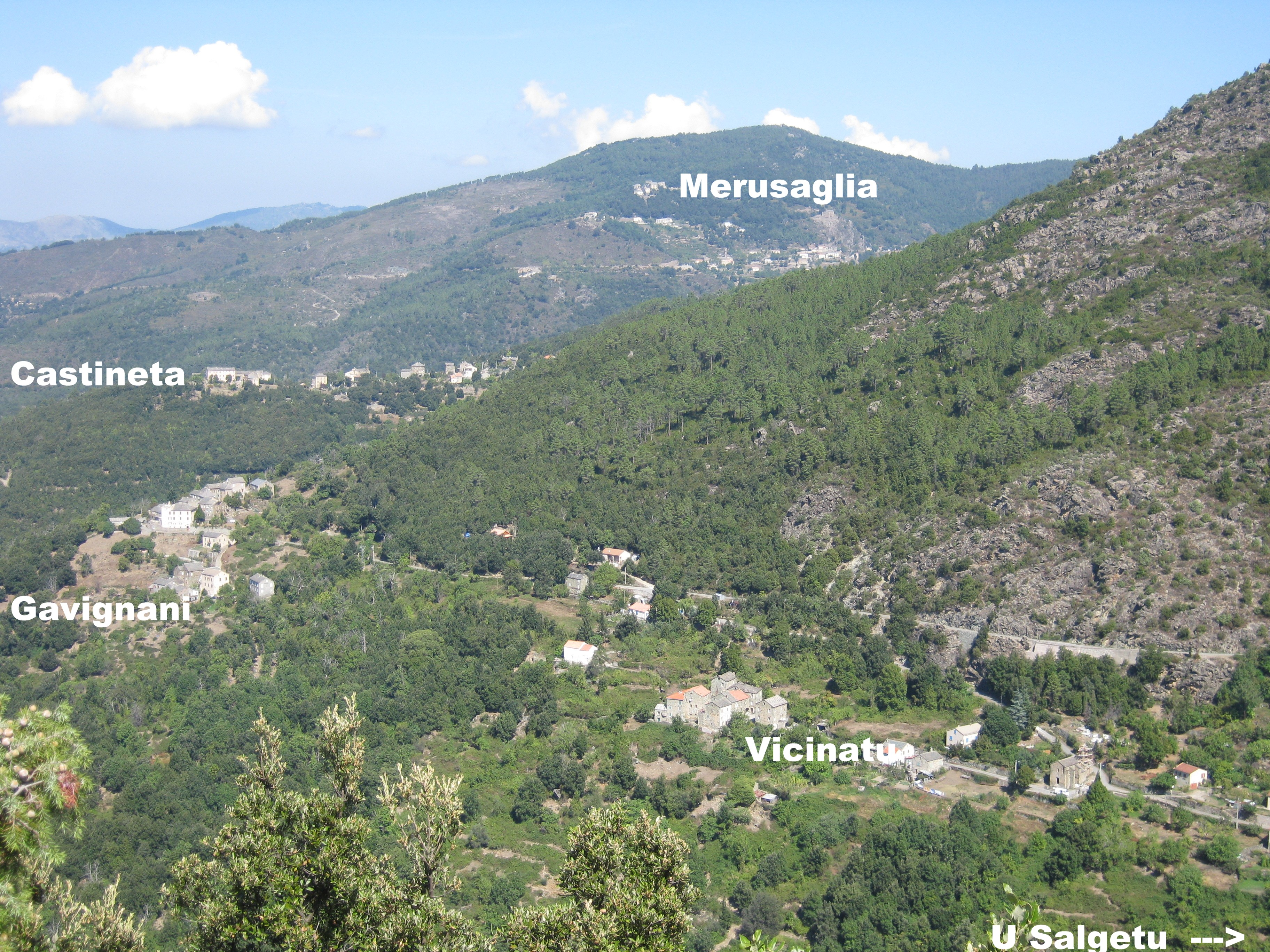 Own work, Author : ghjseppu. Date 2011.9.15 Saliceto , Corsica. hammeau de Vicinatu dans son environnement du Rustinu